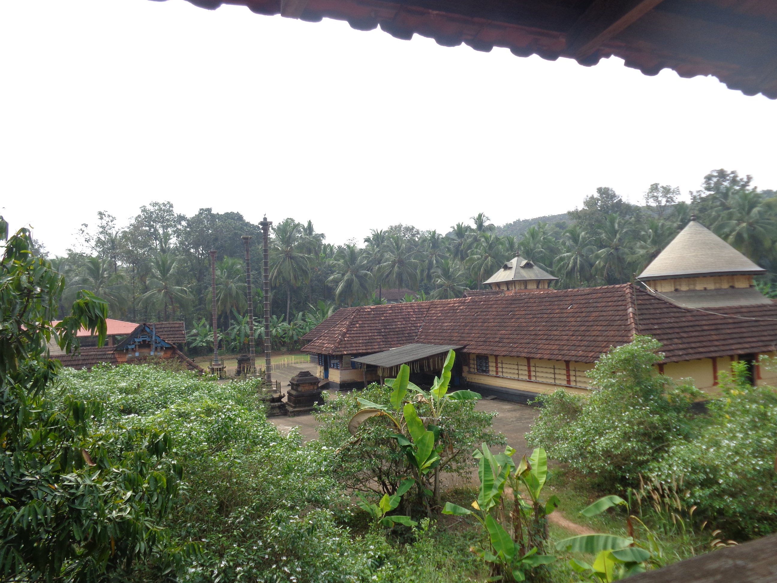 karikkkad subrahmanya temple- a temple view from pathayappura